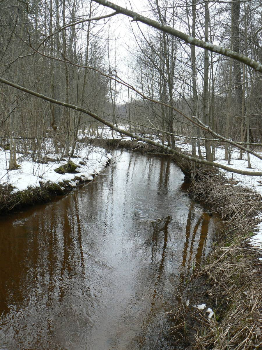 Nigula oja